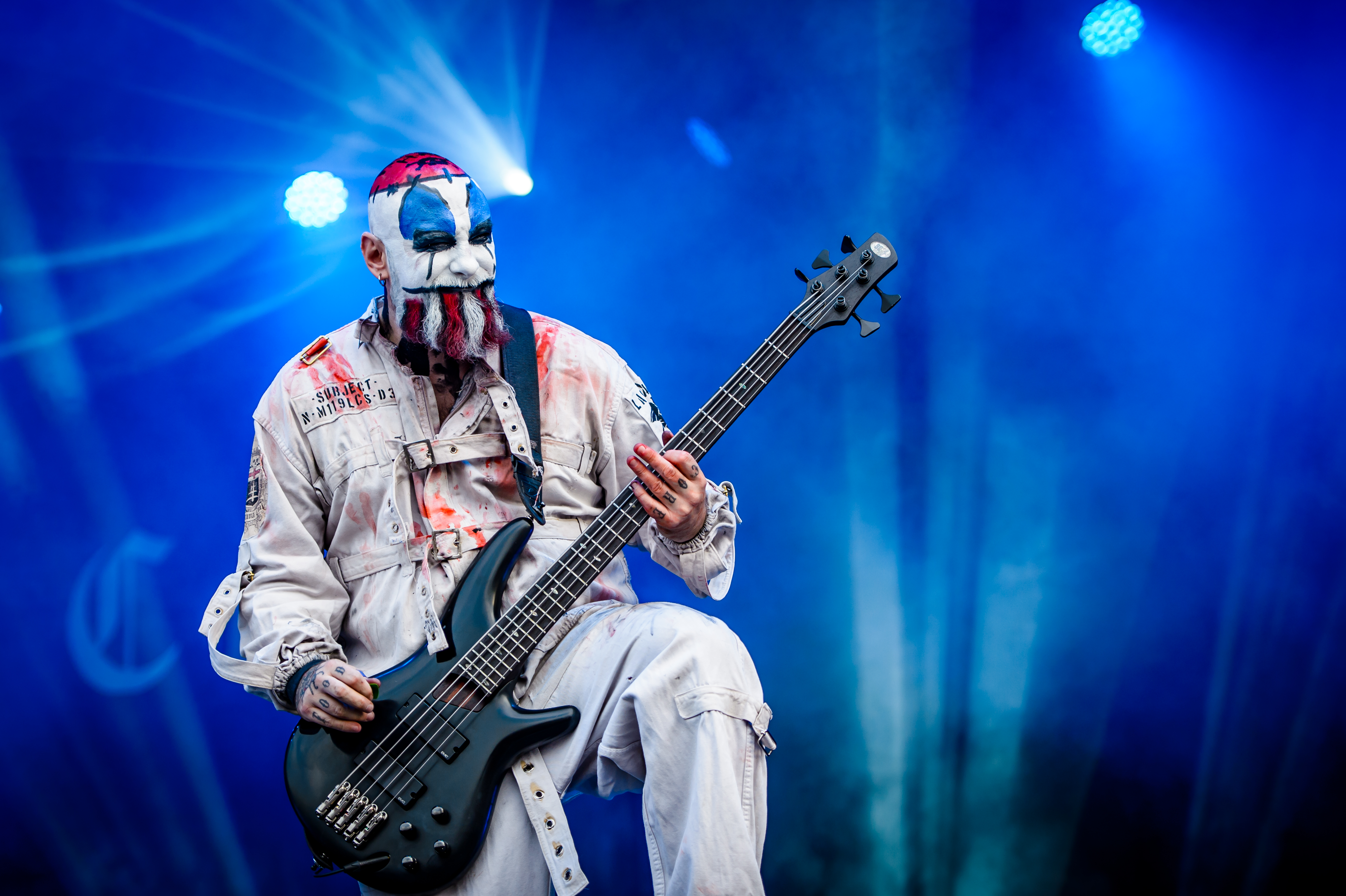 'RockHarz Open Air 2017; Ballenstedt': 'Lacuna Coil'